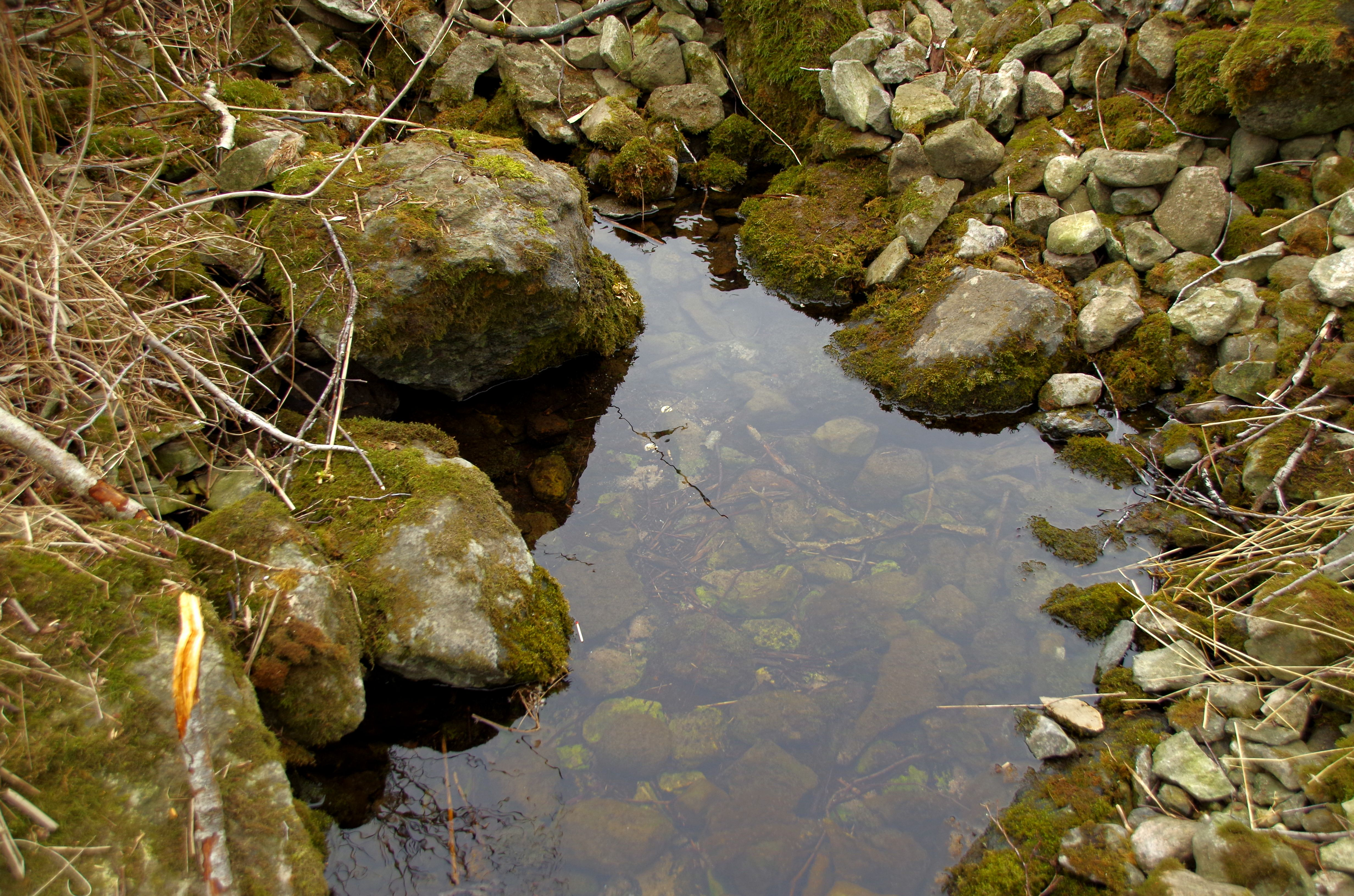 Lümandu ohvriallikas on allikas Rapla maakonnas Märjamaa vallas Kasari jõe vasakul kaldal.